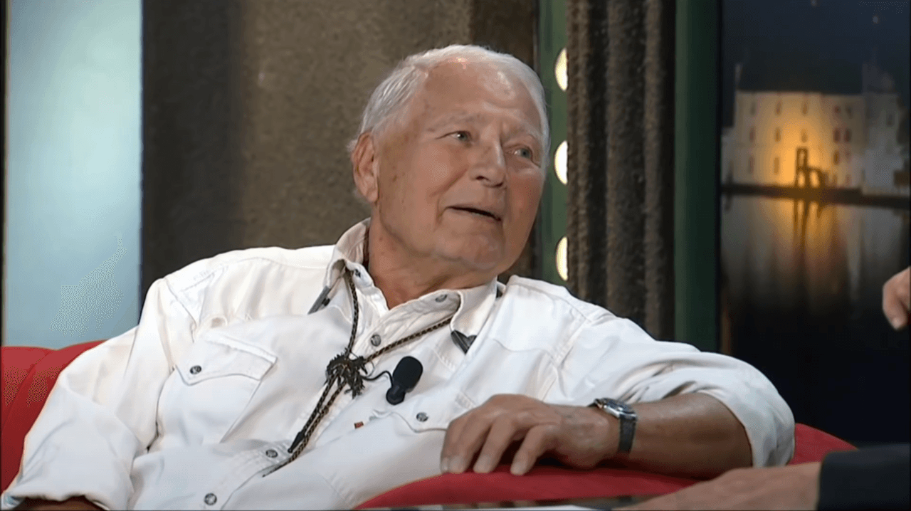 Český herec Karel Fiala v Show Jana Krause - 6. 6. 2014.